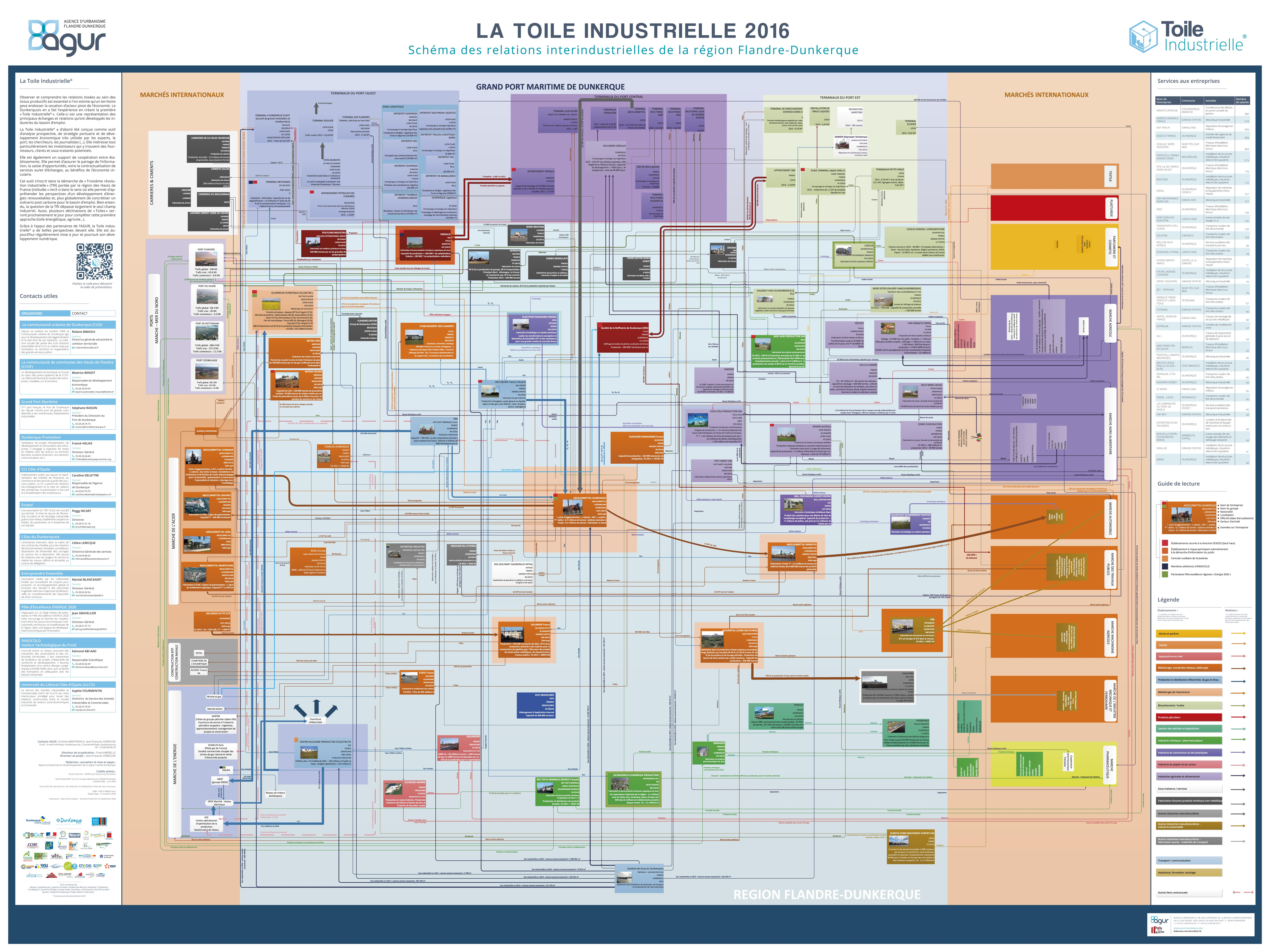 Toile industrielle de la région Flandre-Dunkerque 2016